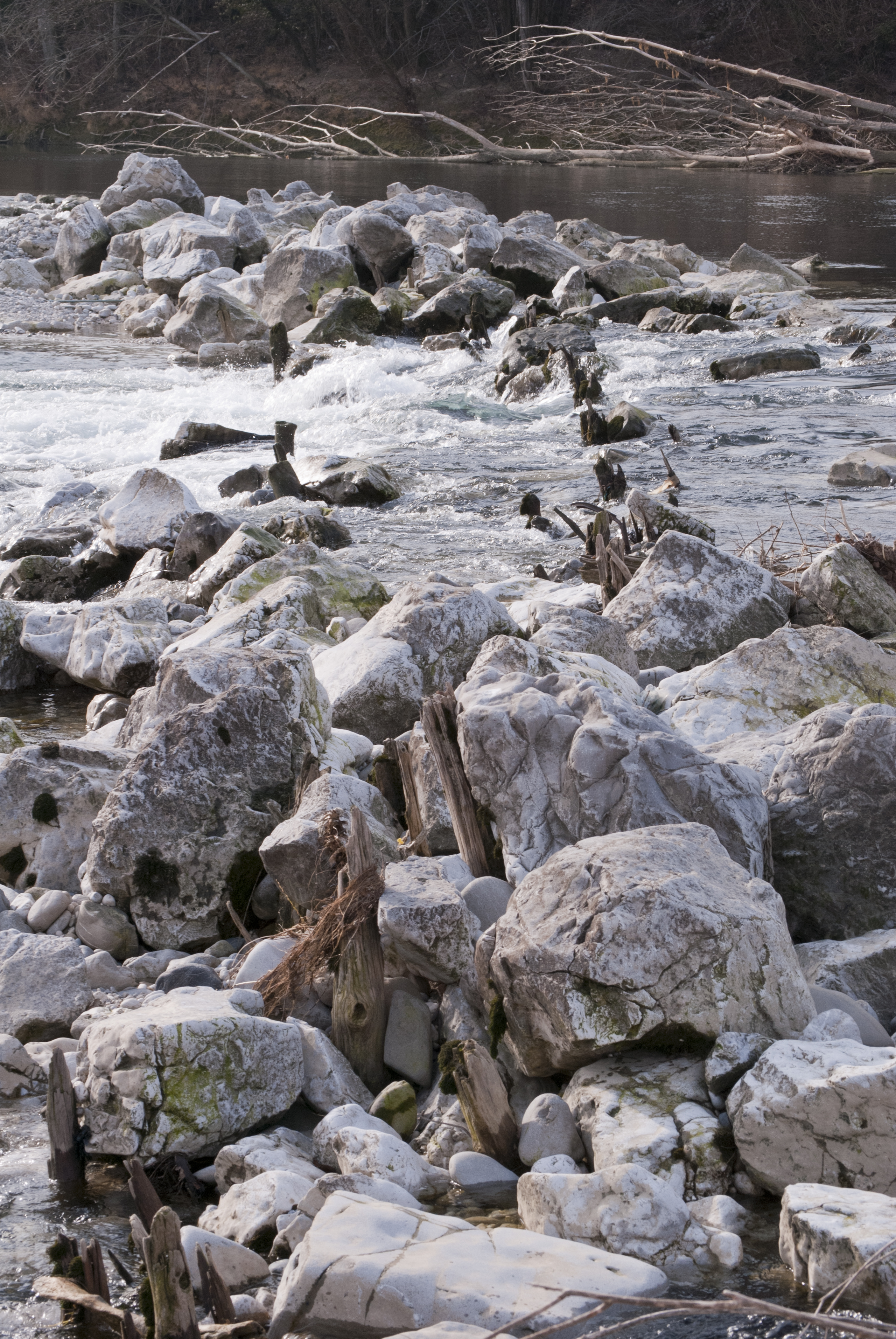 Rovine del ponte romano sul fiume Isonzo. Sono visibili alcune pietre che facevano parte del ponte risalente a Roma Antica. Alcuni pali in legno sono invece resti di un ponte creato durante la Prima Guerra, costruito sopra gli antichi resti.